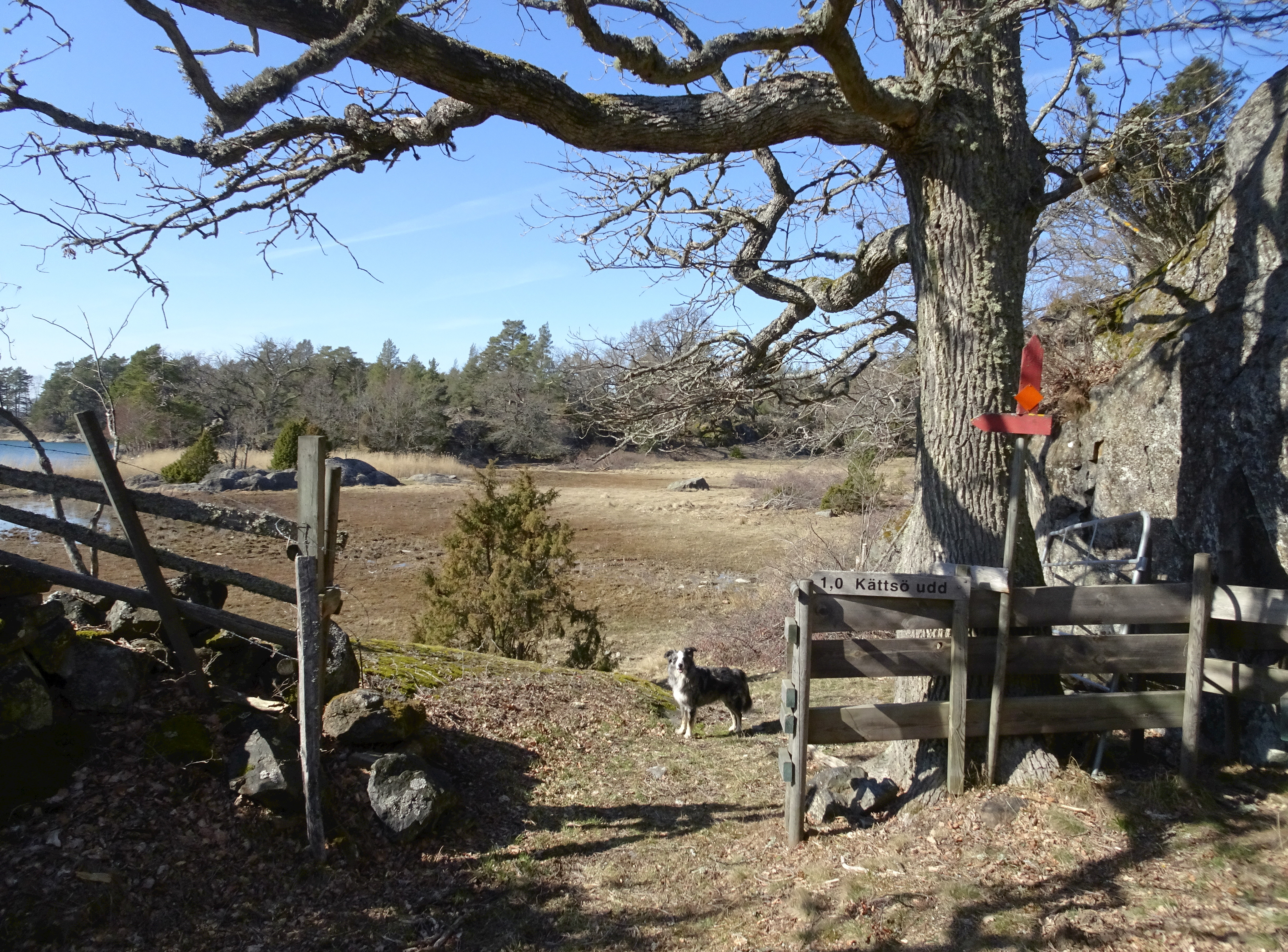 Eriksö naturreservat, markerad vandringsled Kättsö udd